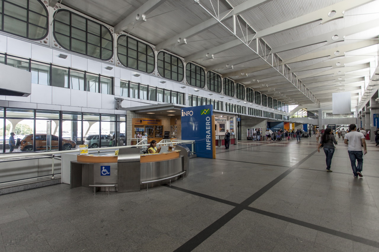 Balcão da Infraero do Aeroporto Internacional de Salvador, em Salvador.